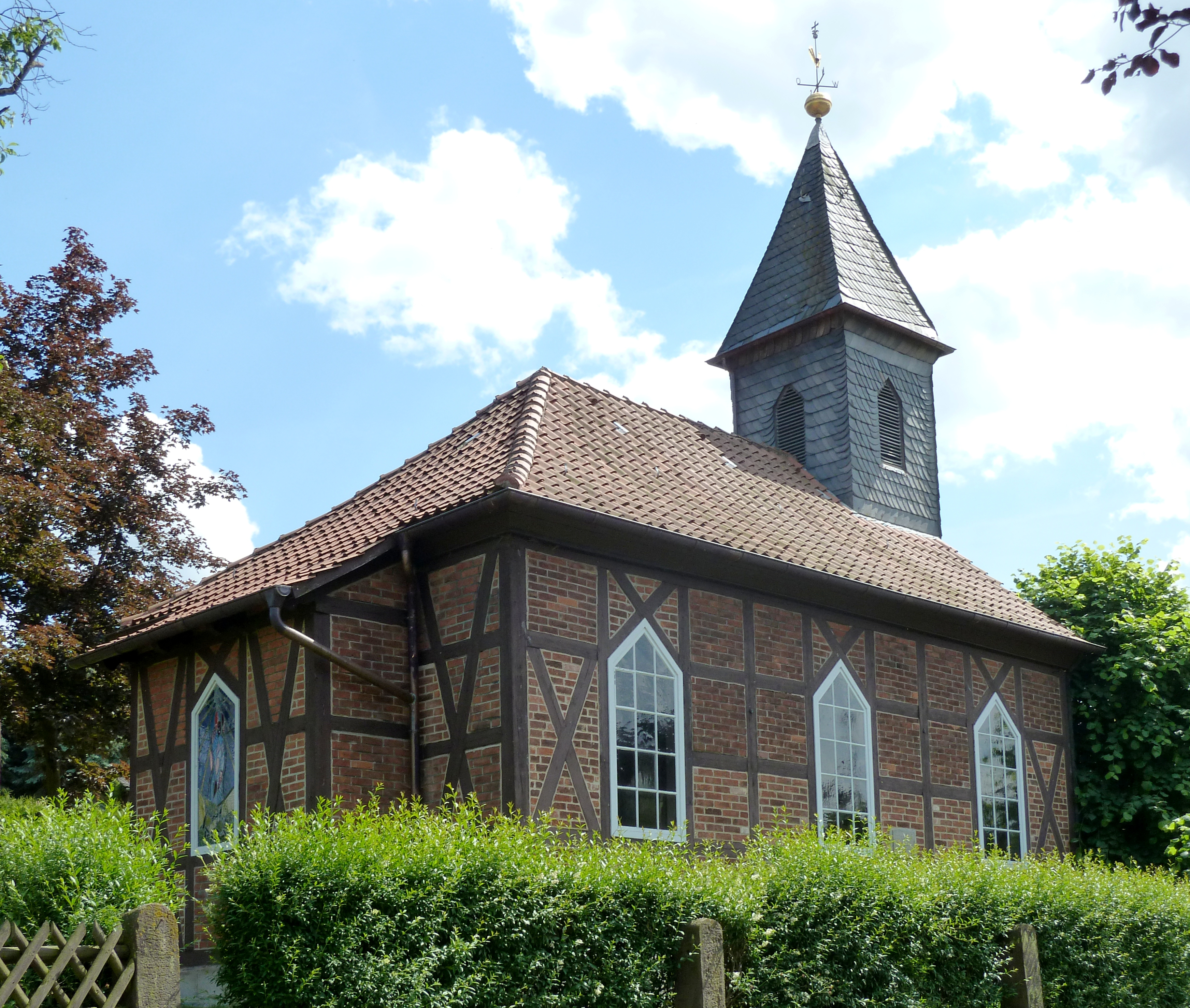 Ev.-luth. Kapelle in Ahlbershausen, Stadt Uslar, Niedersachsen. Fachwerkkapelle mit Ziegelausfachung, erbaut 1893